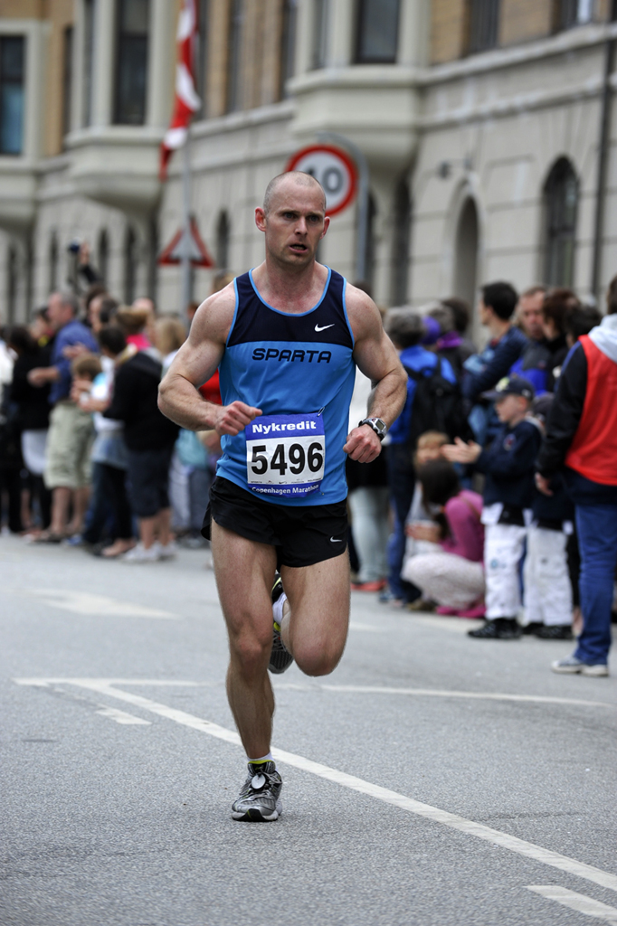 Kian Zanno Ejlertsen@ Københavns Marathon 2010